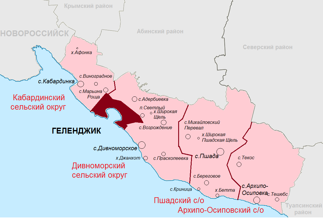 Сельские округа, подчинённые городу-курорту Геленджику